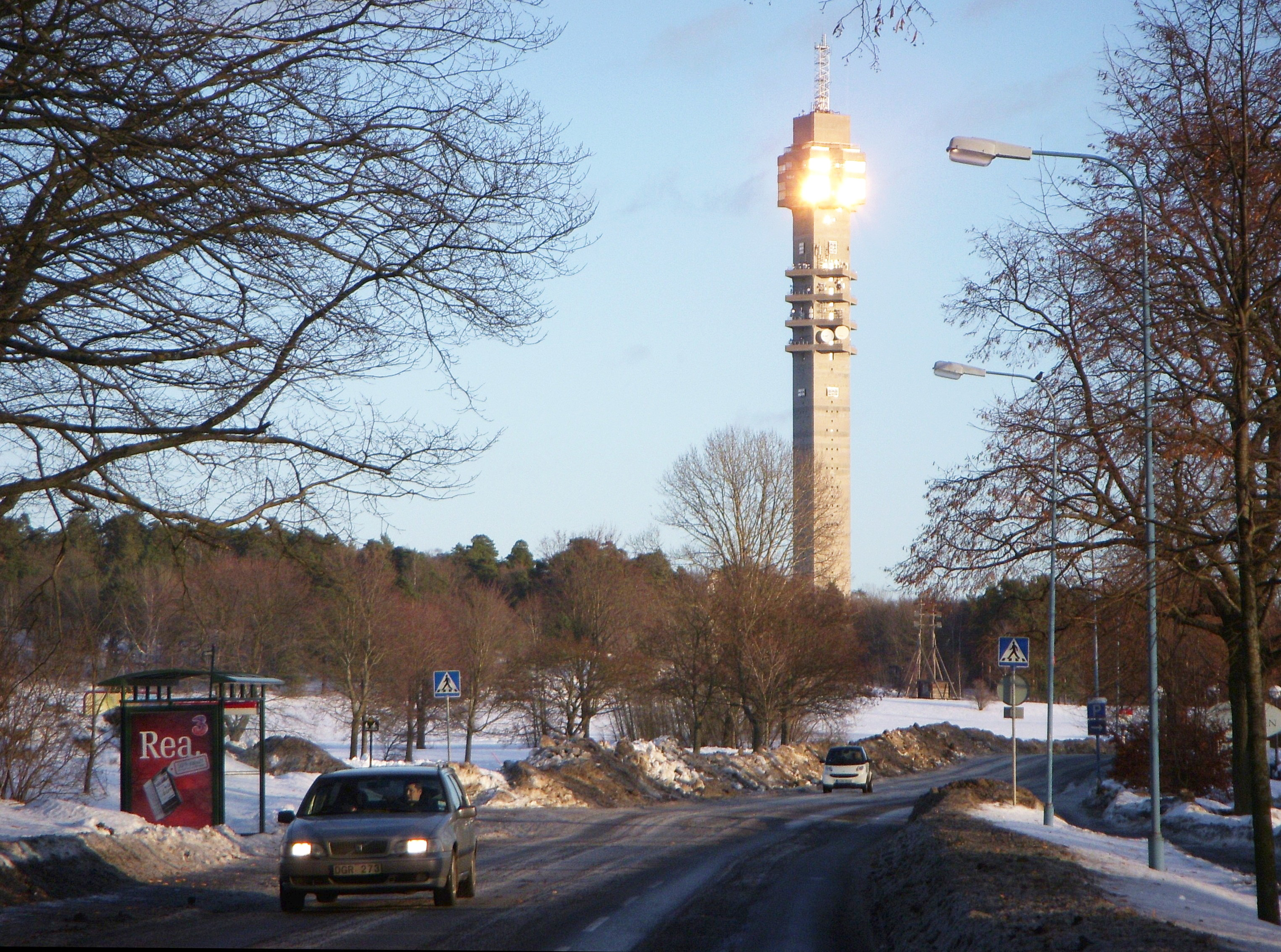 Kaknästornet med solreflexer från Djurgårdsbrunnsvägen i januari 2011